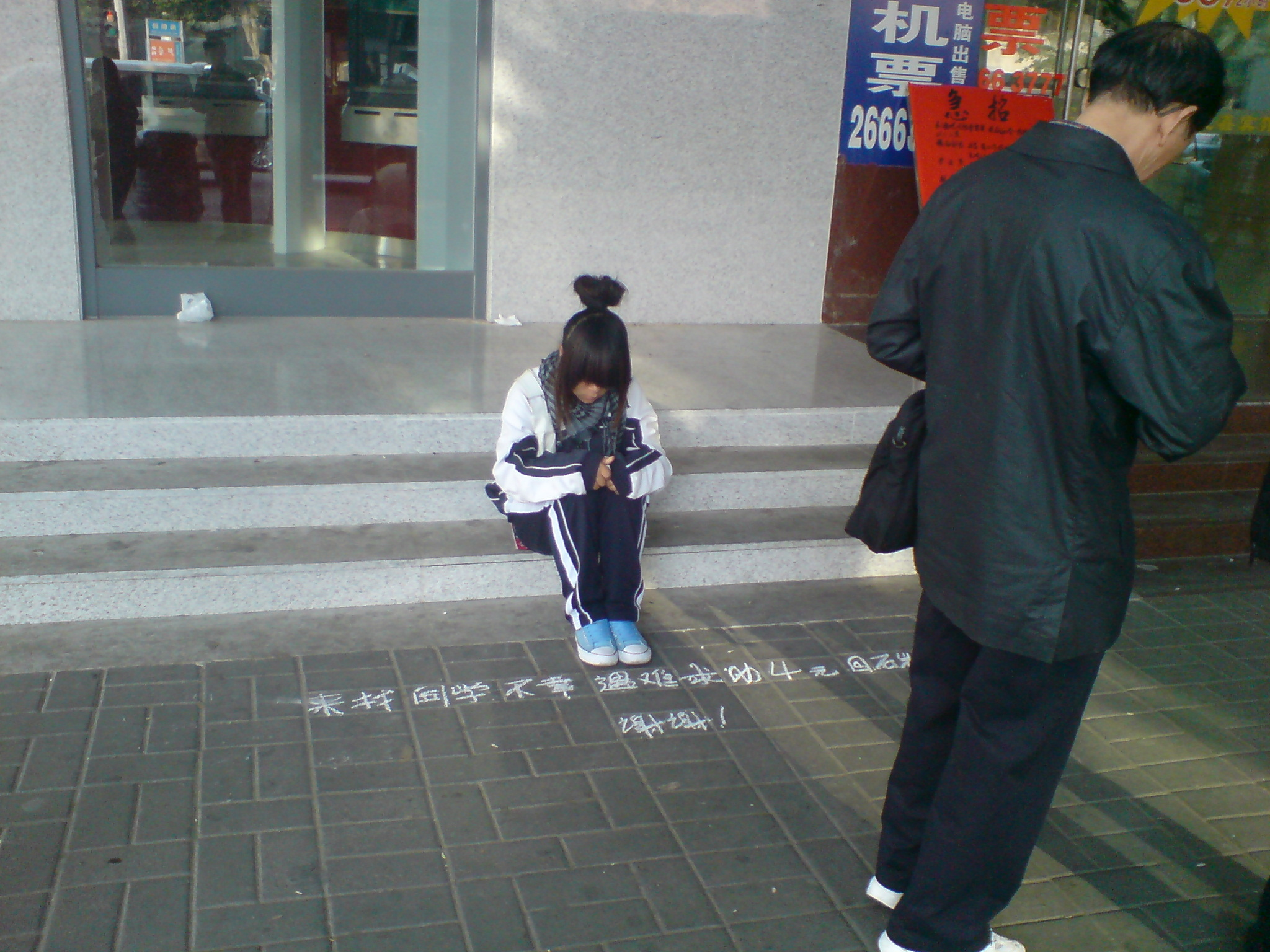 深圳南山區某處有中學生装扮的人在行乞。